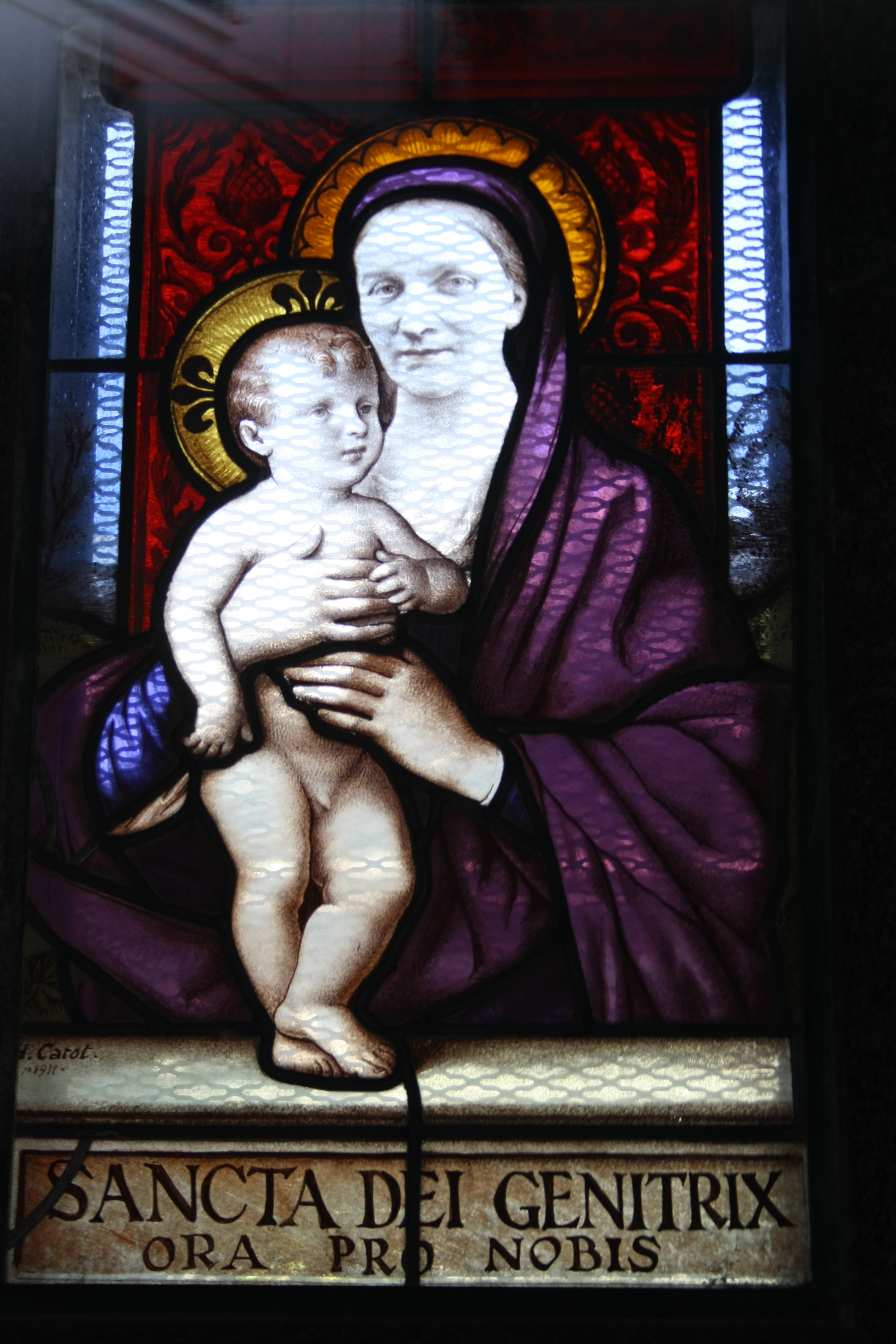 Bleiglasfenster auf den Friedhof von Passy in Paris, Darstellung: Madonna mit Kind, Grab: Famille LAHAYE et PERRIER, Signatur: H. Carot 1911